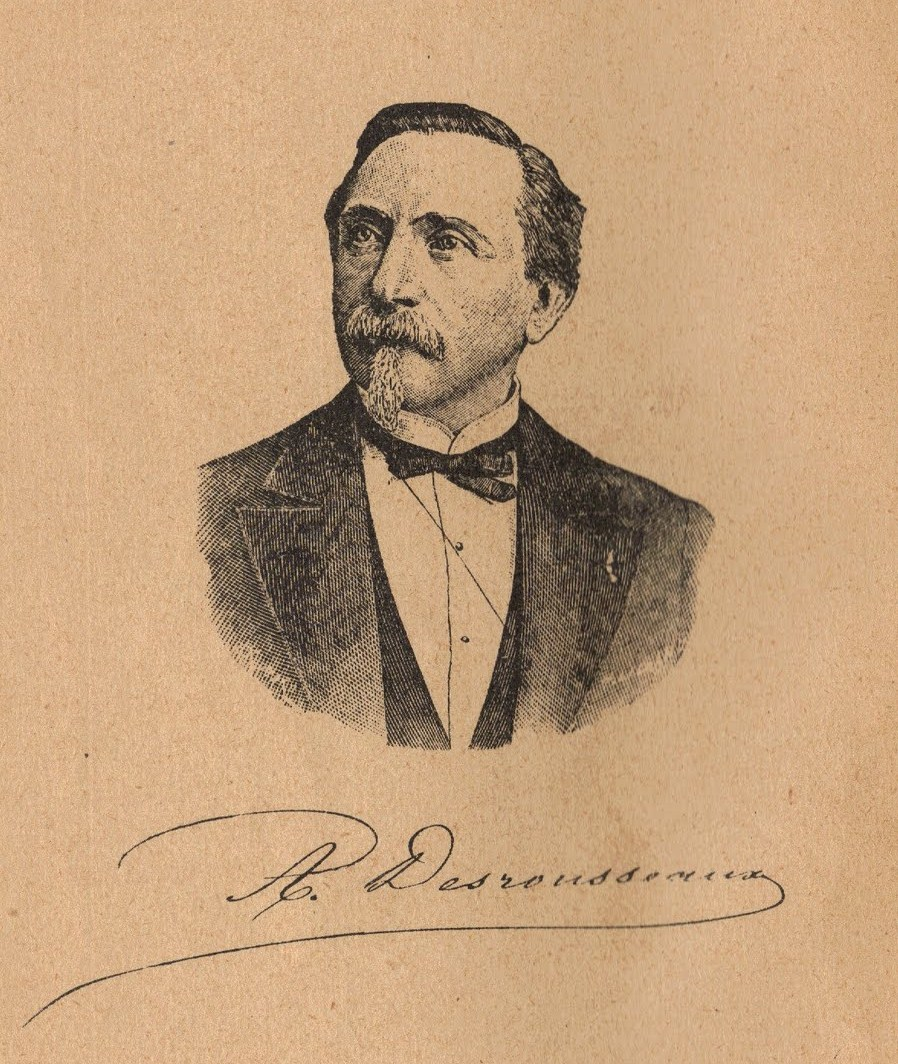 Portrait d'Alexandre Desrousseaux.